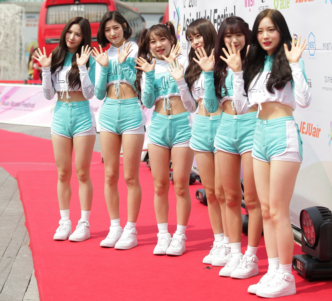 2017 아시아 모델 페스티벌 레드카펫